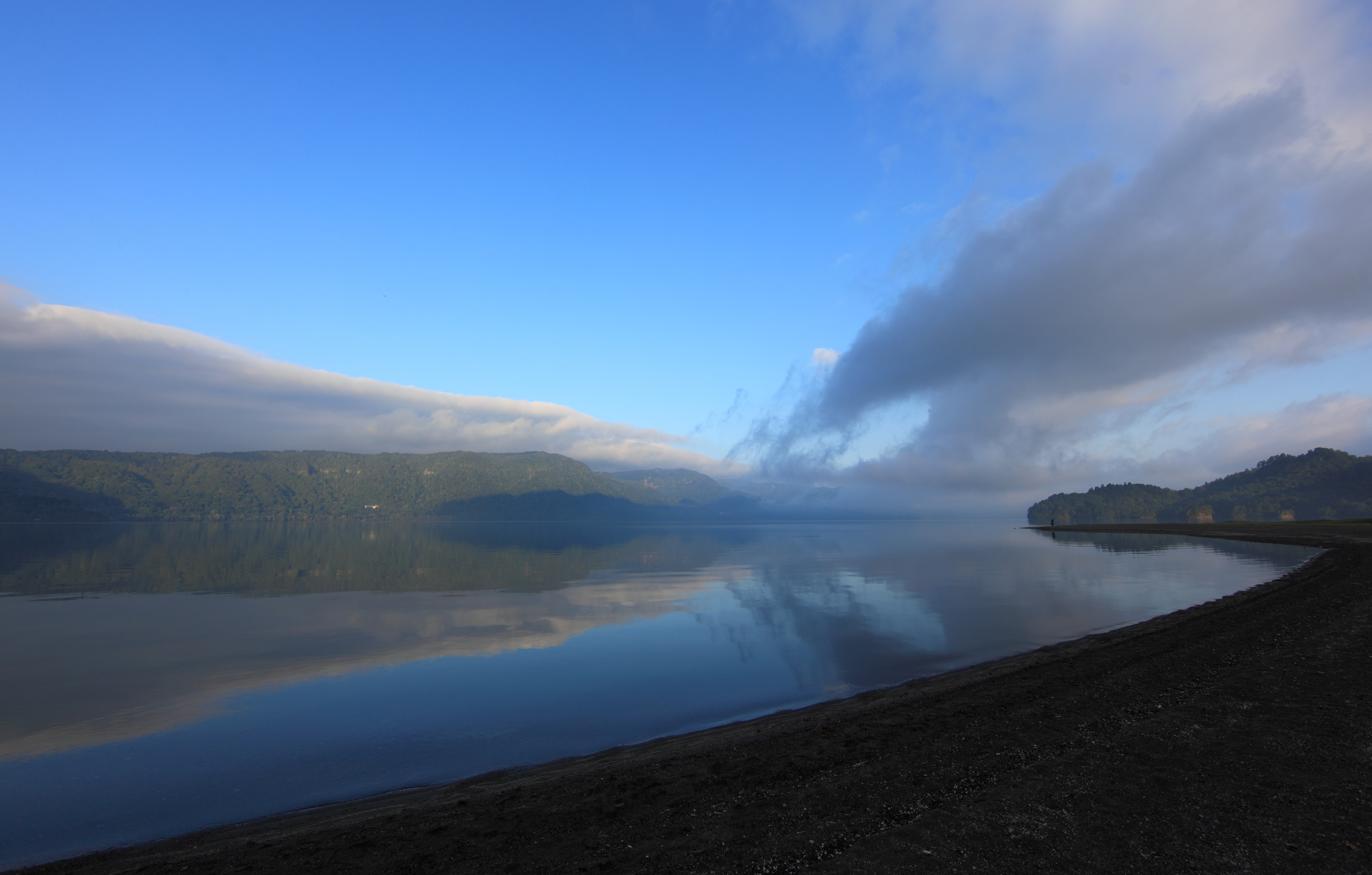 Towada-ko(lake) Aomori-ken(Prefecture), Japan :ja:%e5%8d %e5’%8c%e7”%b0%e6%b9–|青森県(あおもりけん) 十和田湖(とわだこ)